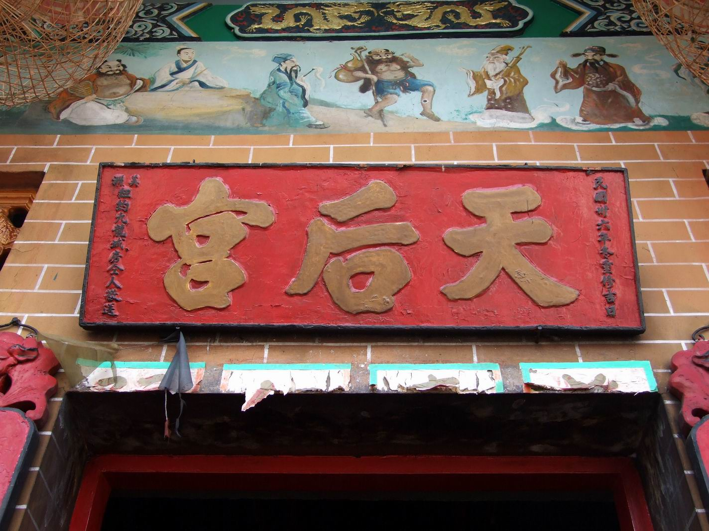 衙前圍村天后宮